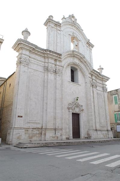 Cattedrale di Santa Maria Assunta a Molfetta